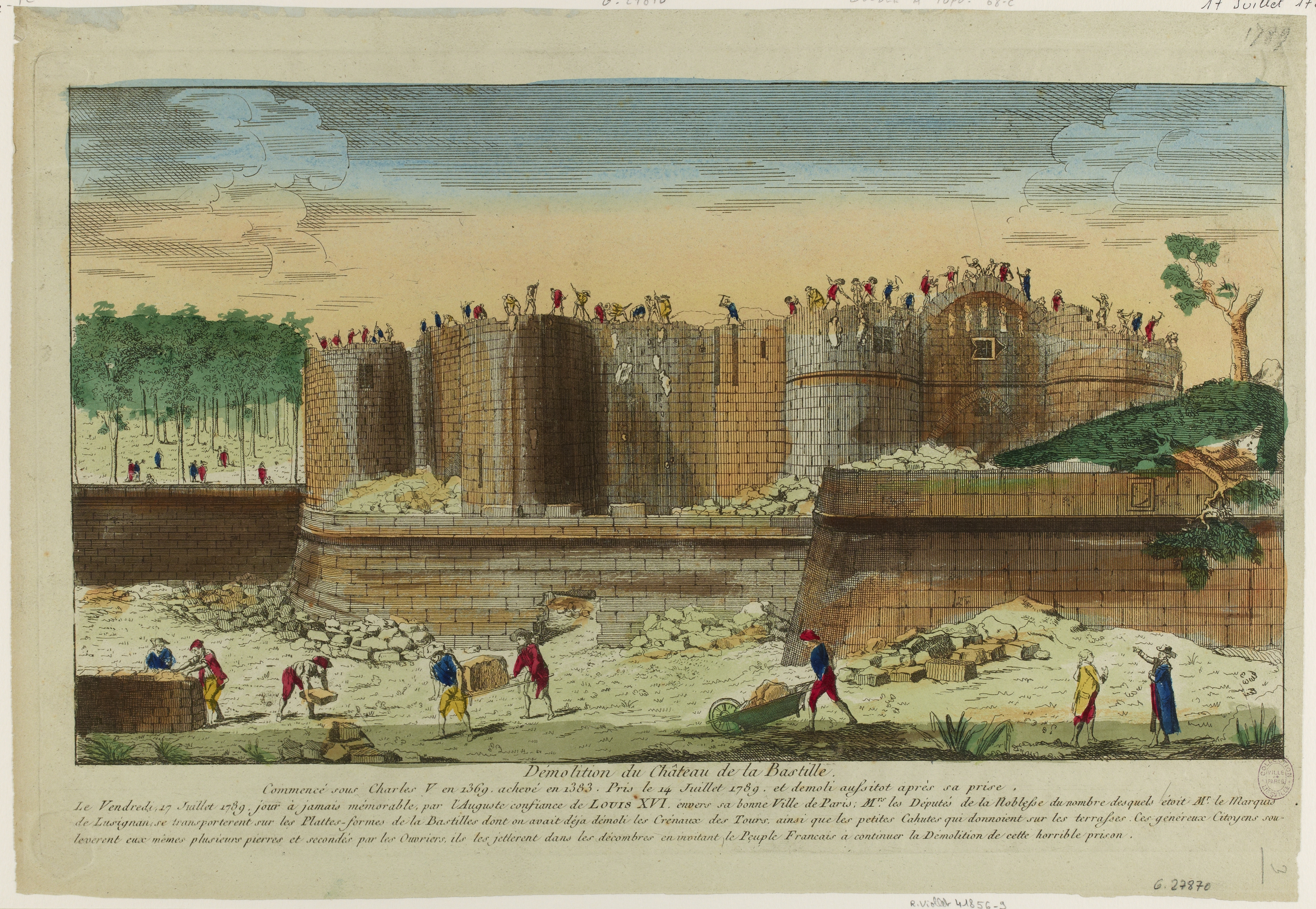 Estampe de la démolition de la Bastille en juillet 1789. Musée de la Révolution française, inventaire N°1984.660